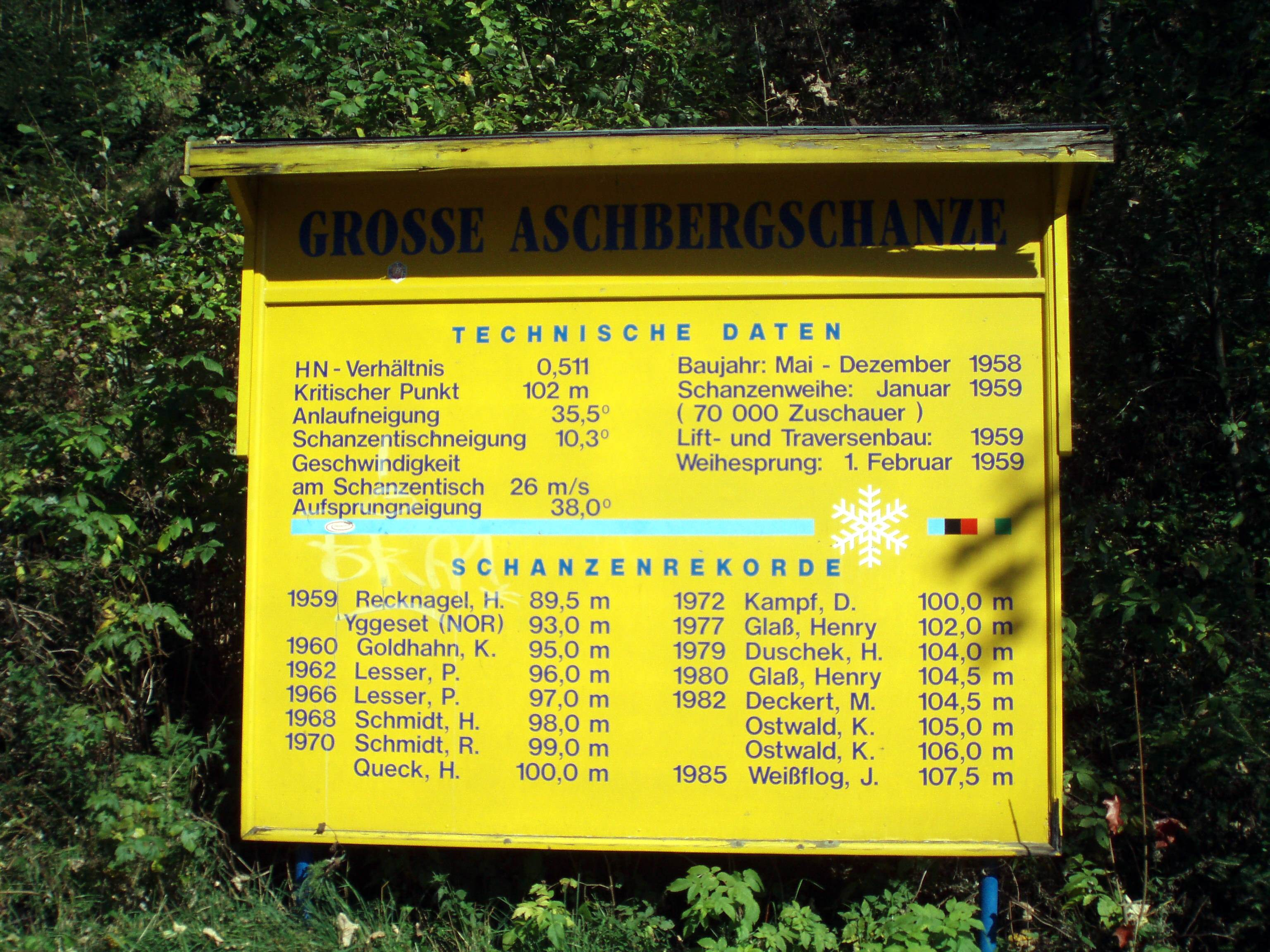 Tafel an der Großen Aschbergschanze